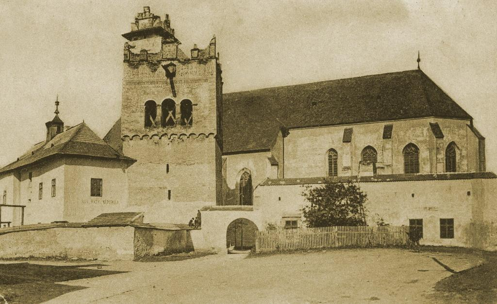 Starý Kežmarok - Bazilika Povýšenia svätého Kríža